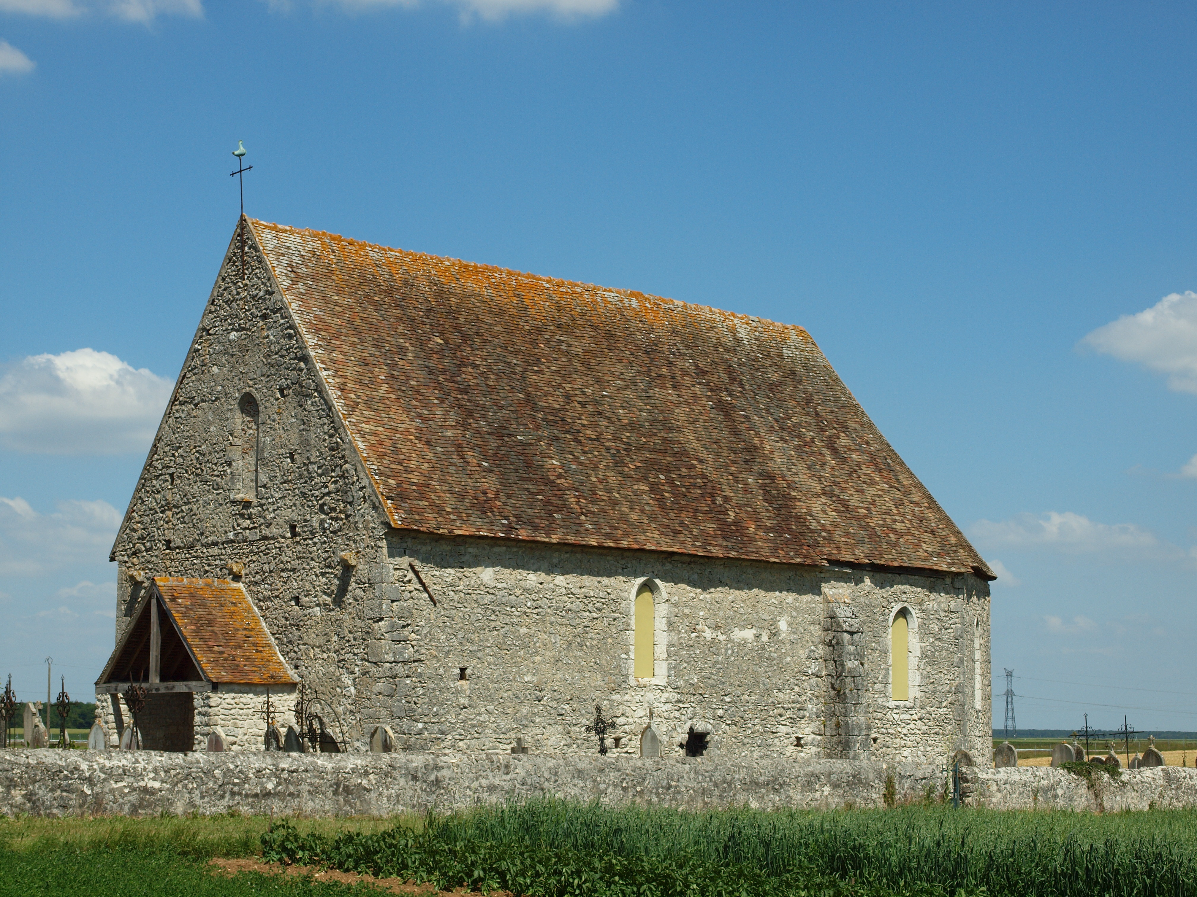 Église Saint-Eutrope de Lagerville (commune de Chaintreaux, Seine & Marne, France)